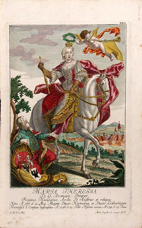 Erzherzogin (Kaiserin) Maria Theresia